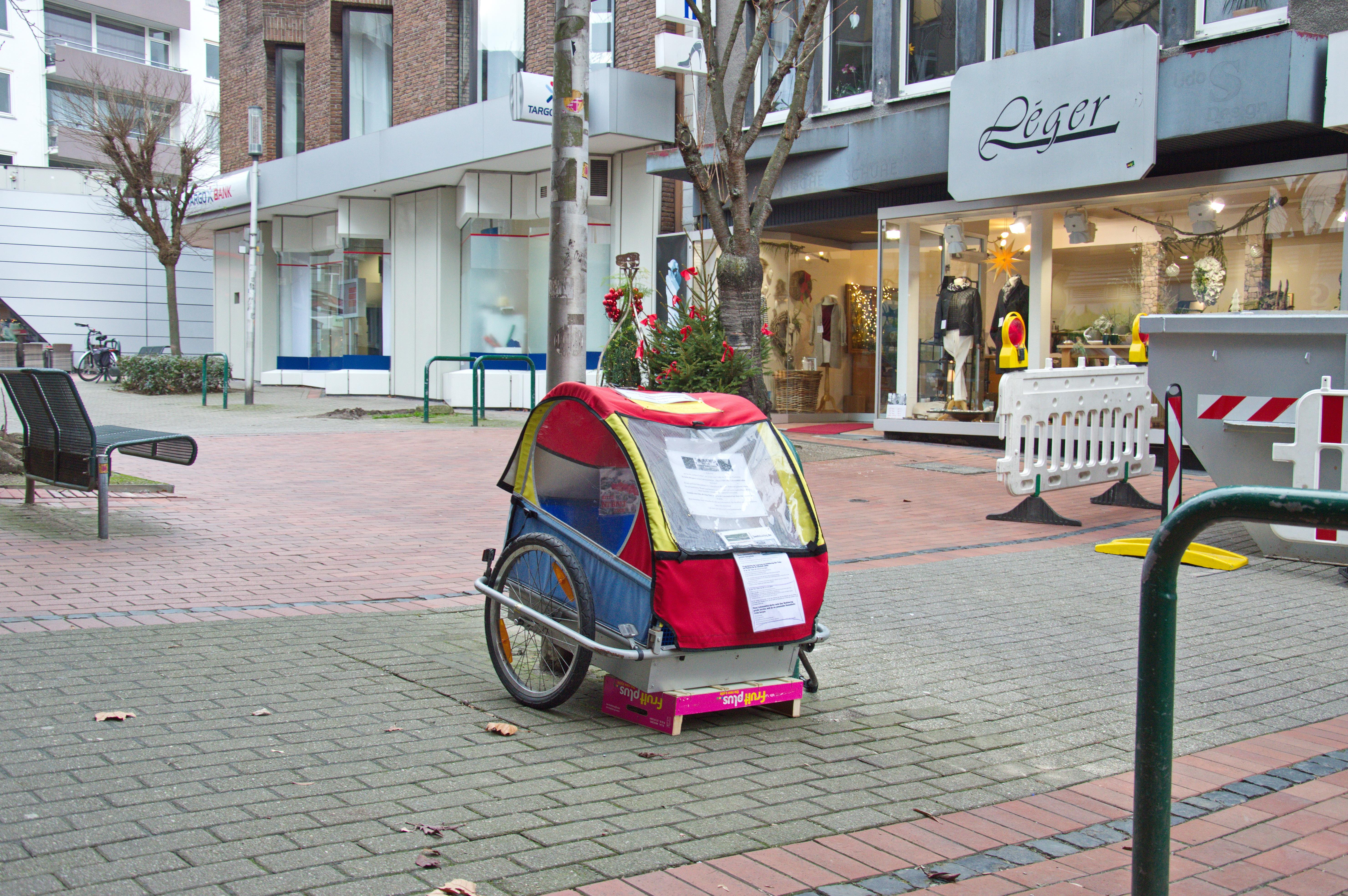 Als Fairteiler (Foodsharing-Verteilstation) genutzter Fahrradanhänger Leckerer Lothar in der Steinstraße in Witten